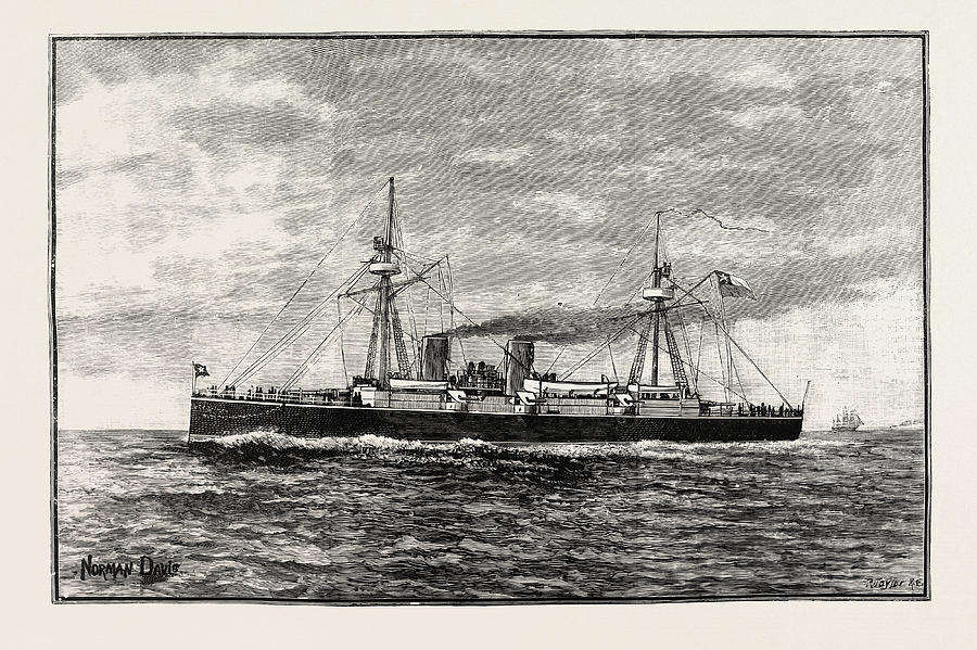 El Crucero Esmeralda es un crucero de fierro de 3.ooo toneladas, construido en 1884 por Sir William armstrog & Co. de Newcastle on tyne. Tiene un armamento excepcional para su tamaño y cañones protegidos por blindajes de fierro, forma parte de la escuadra del Congreso.